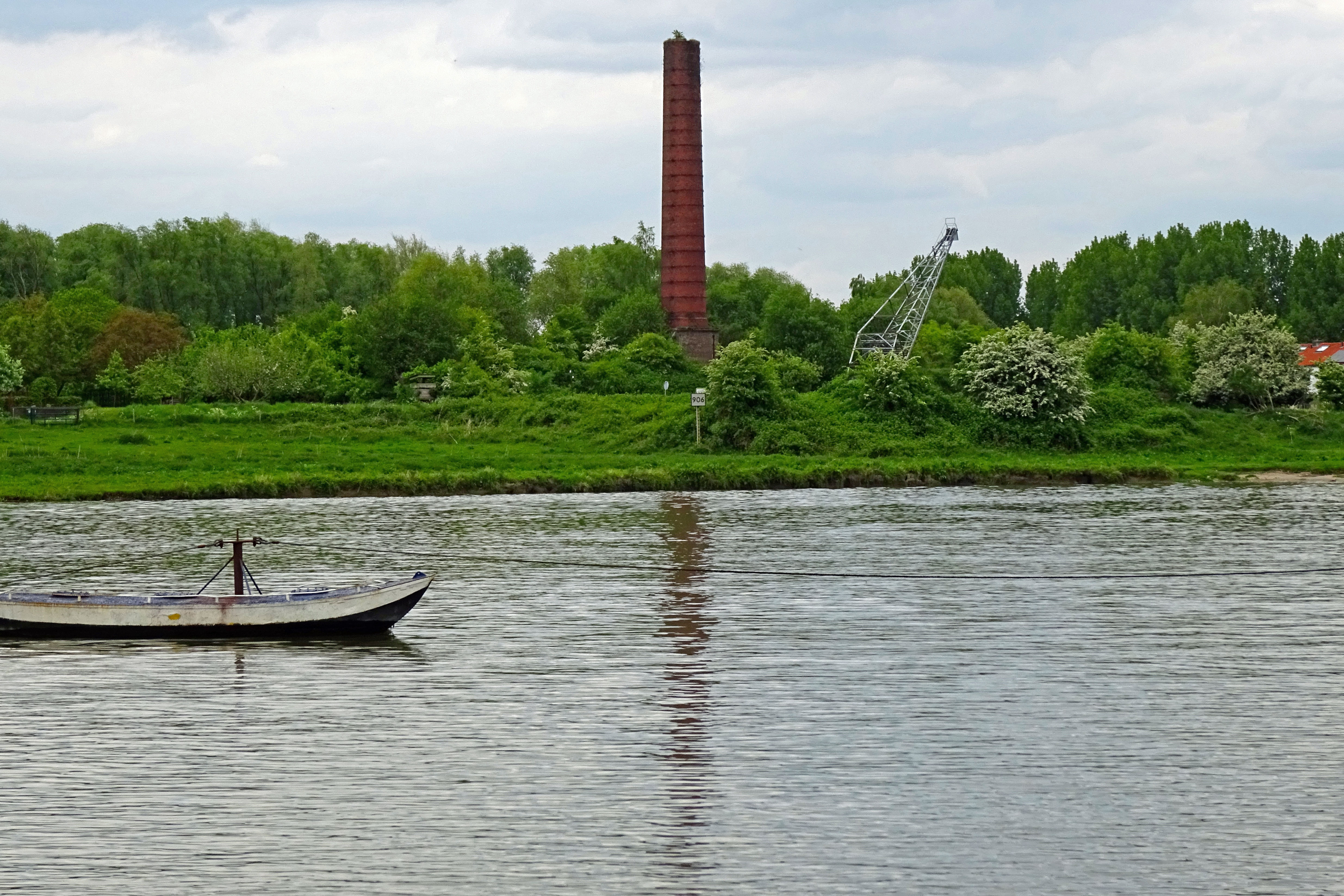 De Nederrijn met aan de overzijde de schoorsteenpijp van de voormalige steenfabriek de Blauwe Kamer